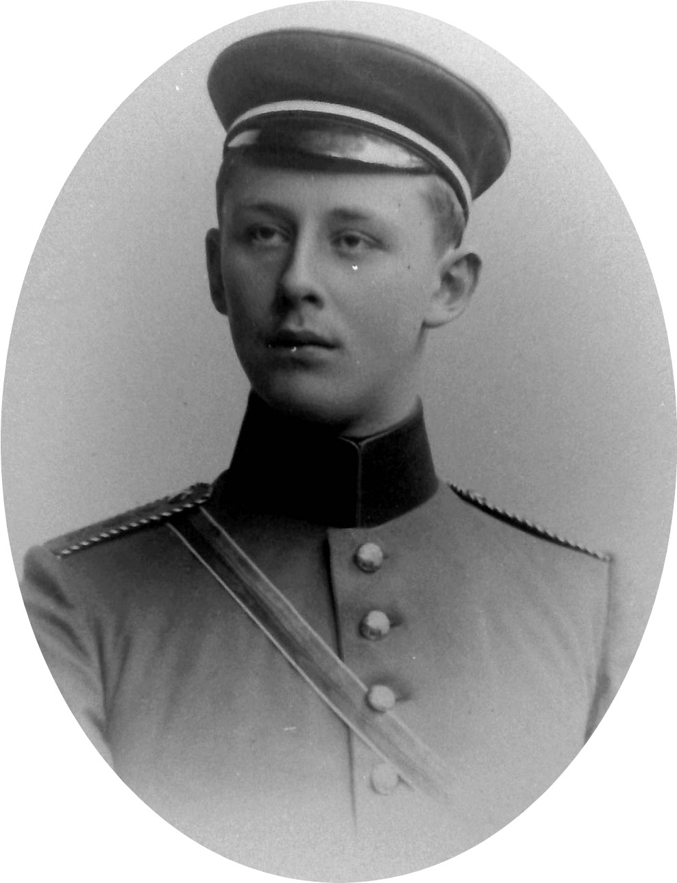 Porträtfotografie von Robert Großmann als Militärfuchs eines Straßburger Corps